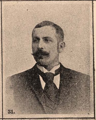 Gedeon Gellért szolgabíró (füzéri járás)